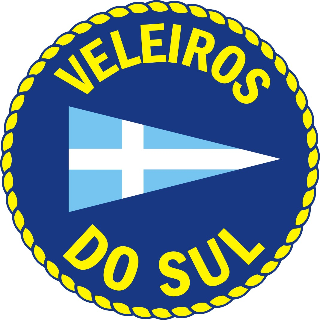 Logotipo do clube náutico brasileiro Veleiros do Sul.